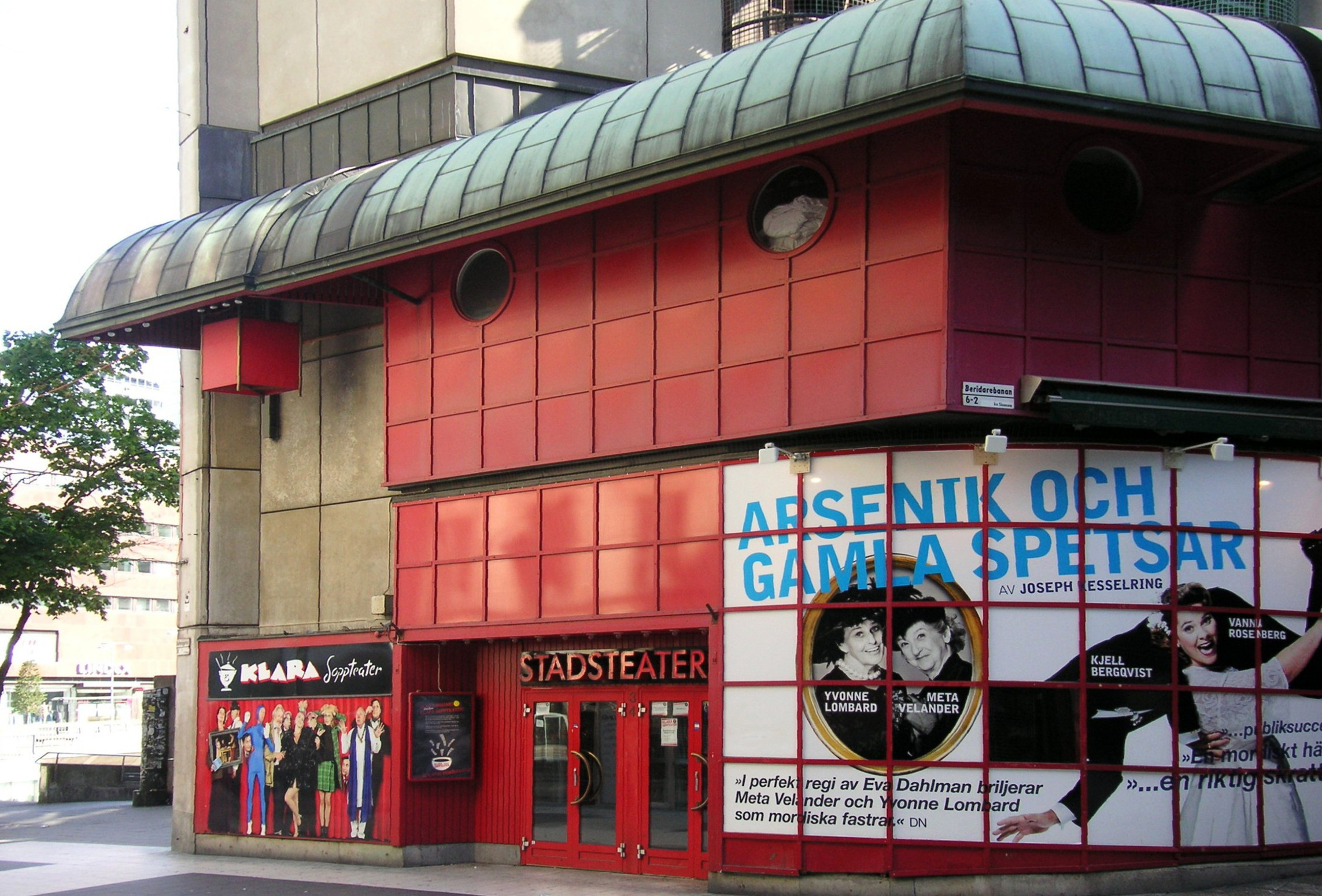 Stockholms Stadsteater, ingången från Drottningatan